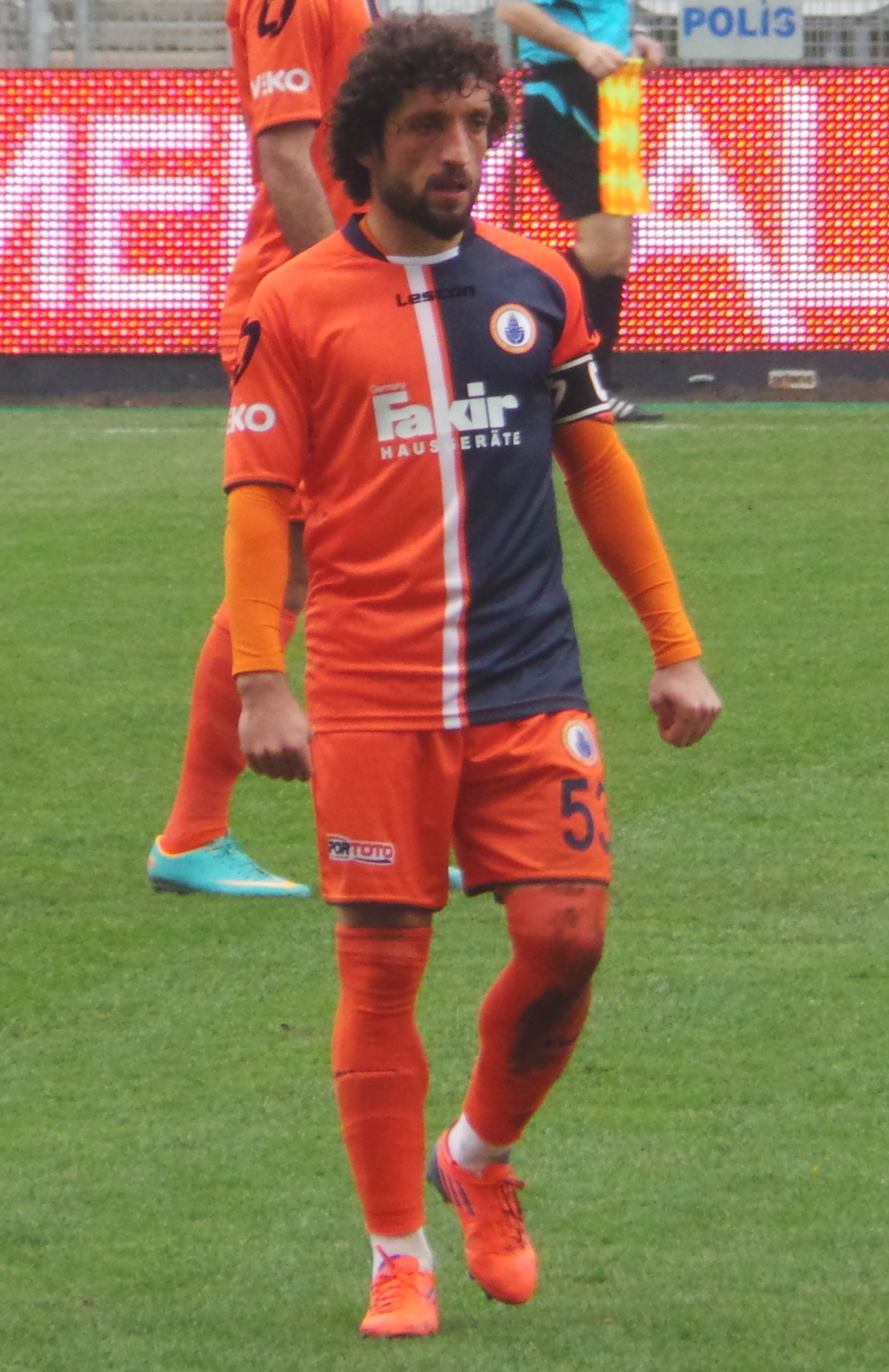 Rızvan Şahin